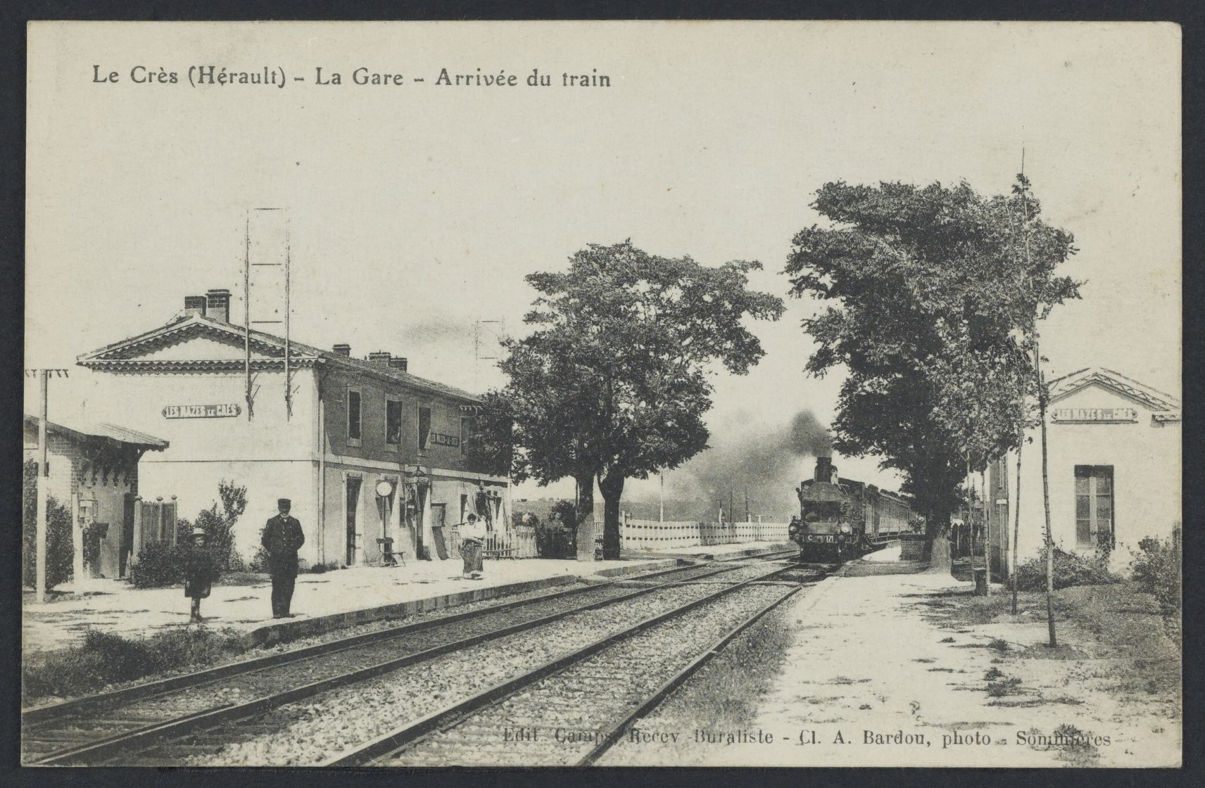 Le Crès. - La Gare, arrivée du train : carte postale